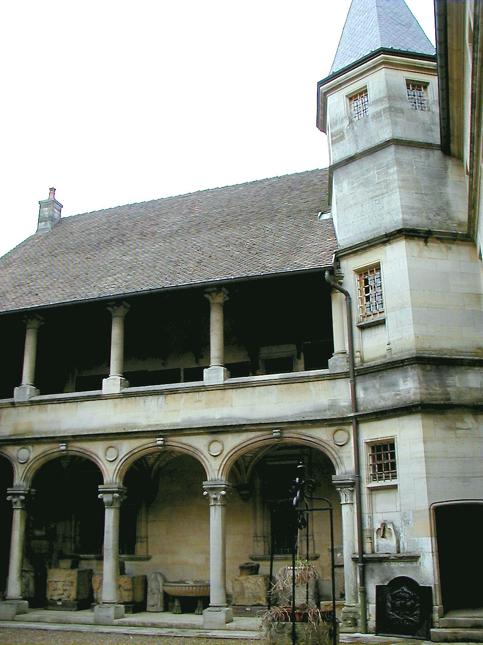 Verdun - Hôtel de La Princerie - Cour